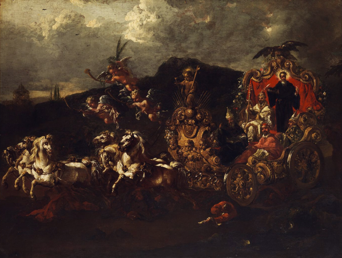 P. P. Roos (Rosa di Tivoli): Triumphzug der Kirchenväter, Öl auf Leinwand, 94 x 120 cm